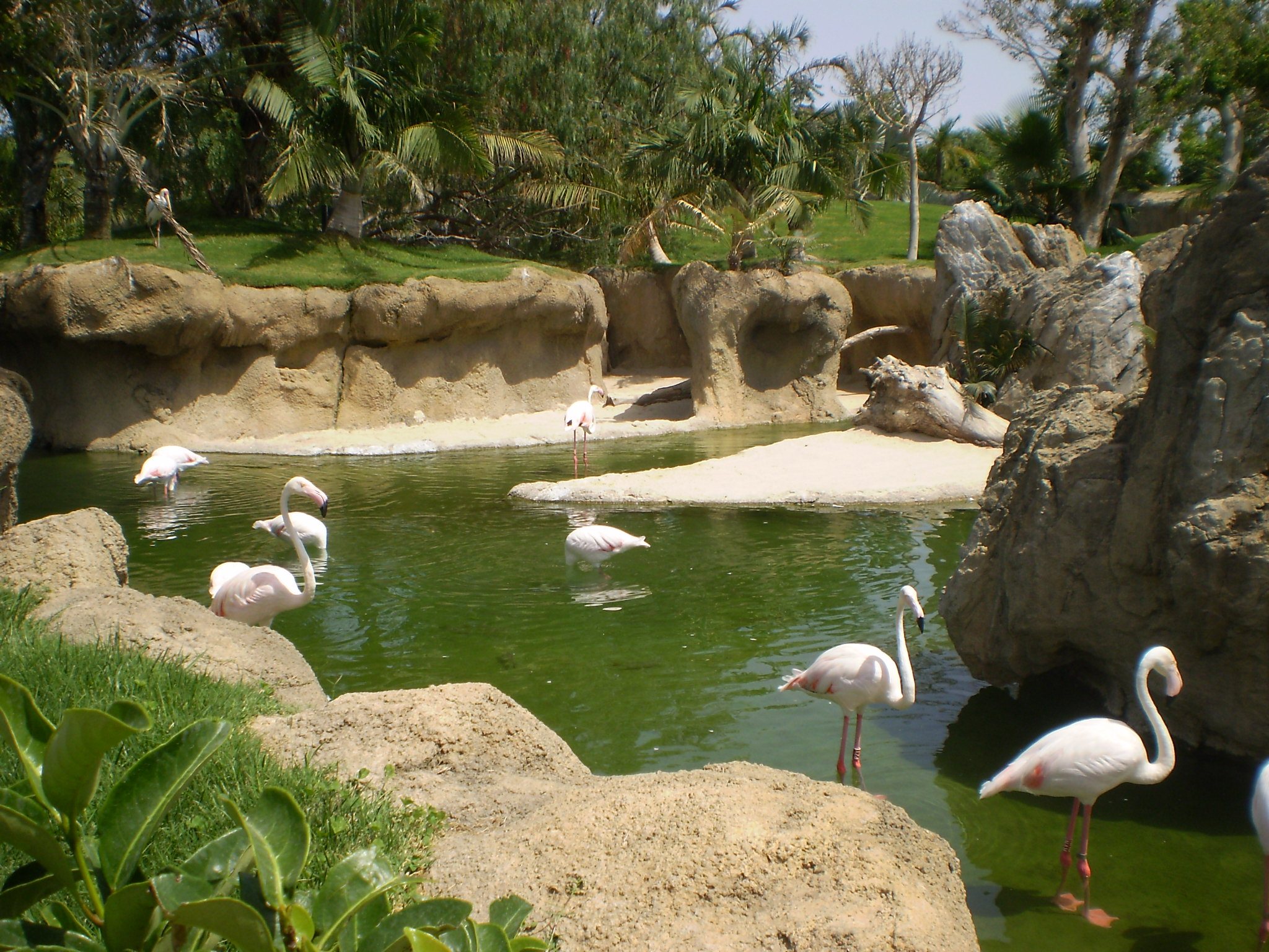 Bioparc: Flamencos Chilenos situados en la region Madagascar